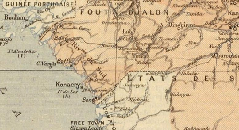 Détail de carte publié par Le Temps en mars 1890 pour illustrer le voyage du Capitaine Binger 1887-1889